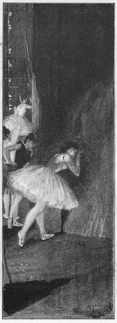 Hinter den Kulissen vor dem Ballet (Fragment)